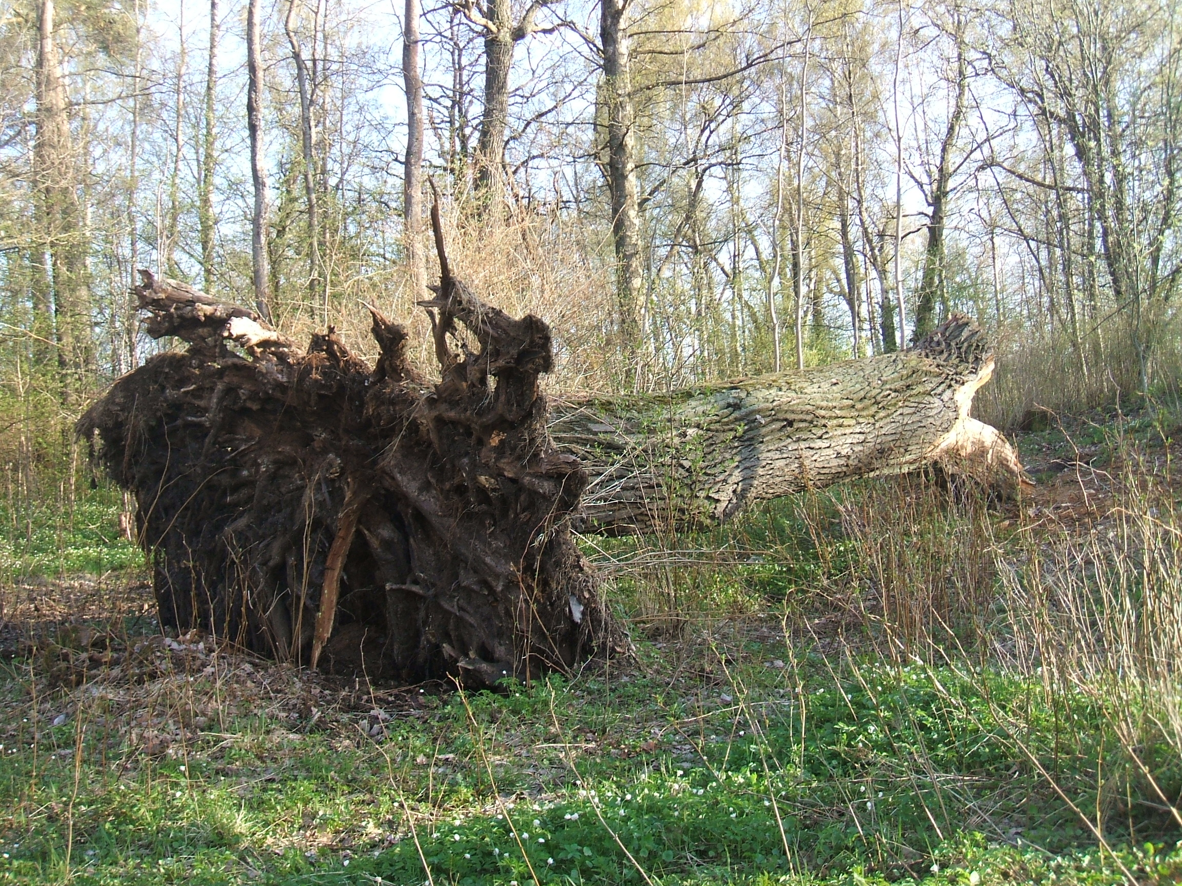 Участь 300 летних дубов после бури. Сестрорецкие Дубки СПб.